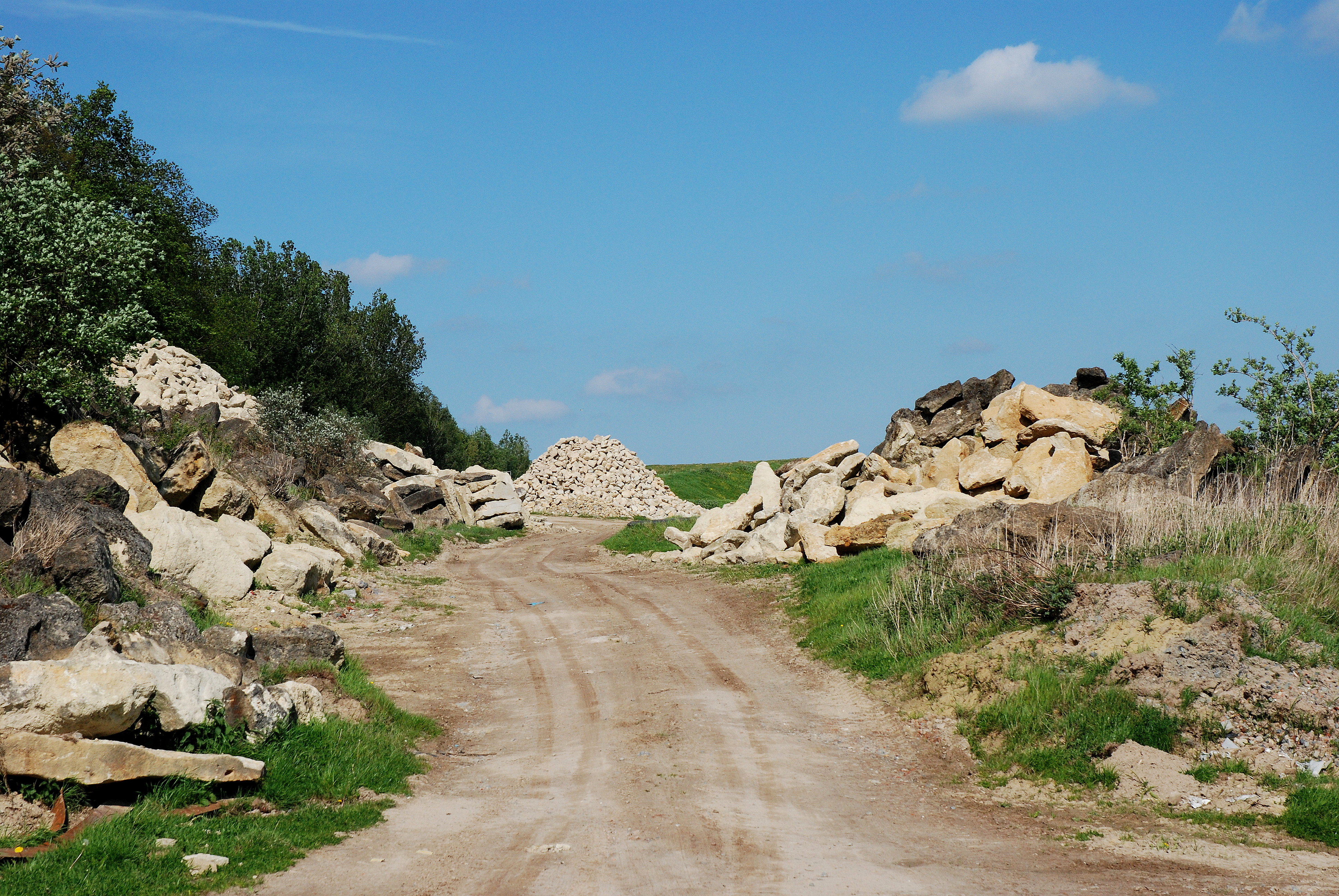 De groeve te Balegem, België, waar Balegemse steen wordt ontgonnen